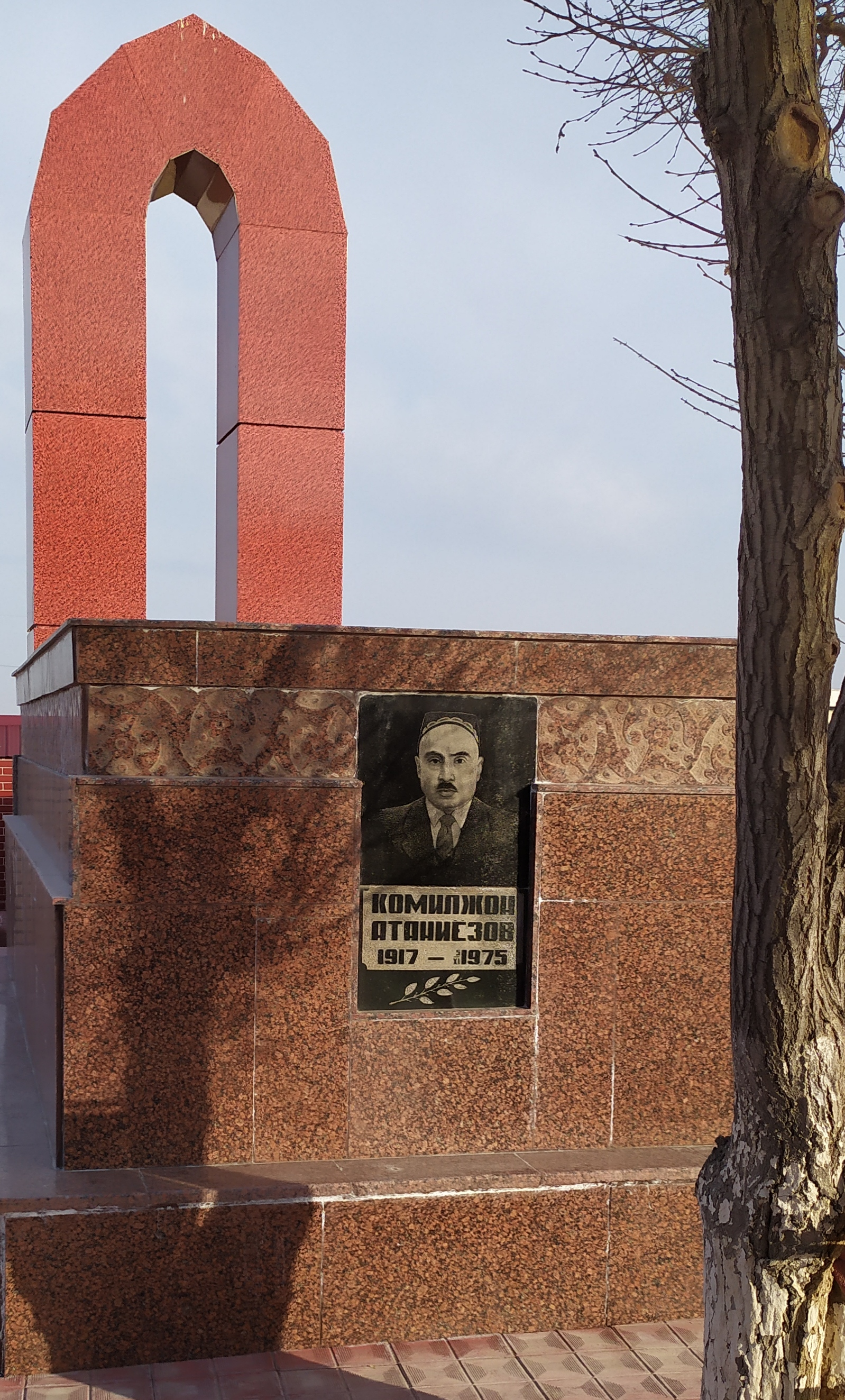 Могила Комилжона Атаниёзова в Ургечском районе.